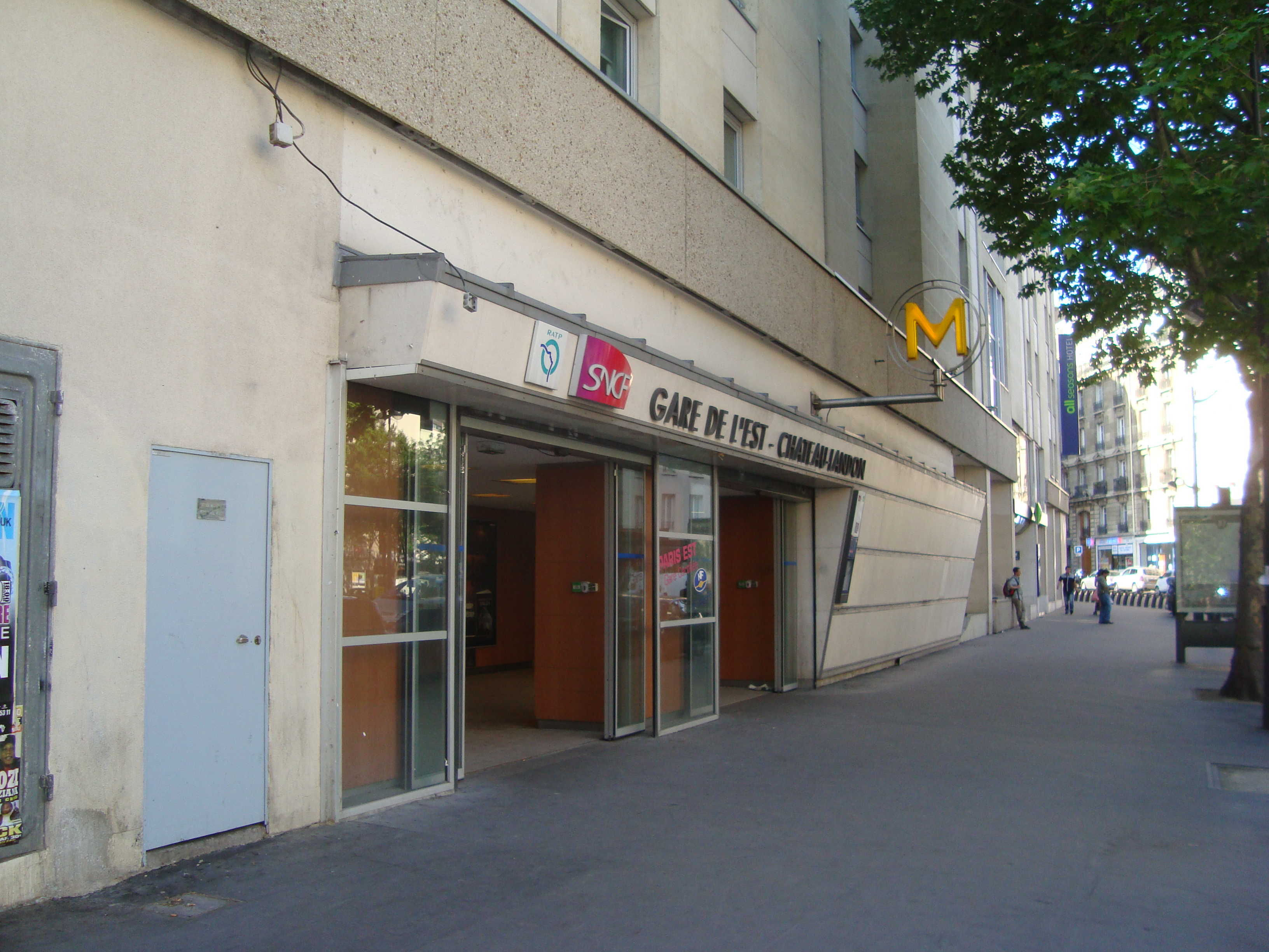 Entrée la station de métro Château-Landon sur la ligne 7 rue de Chateau Landon.